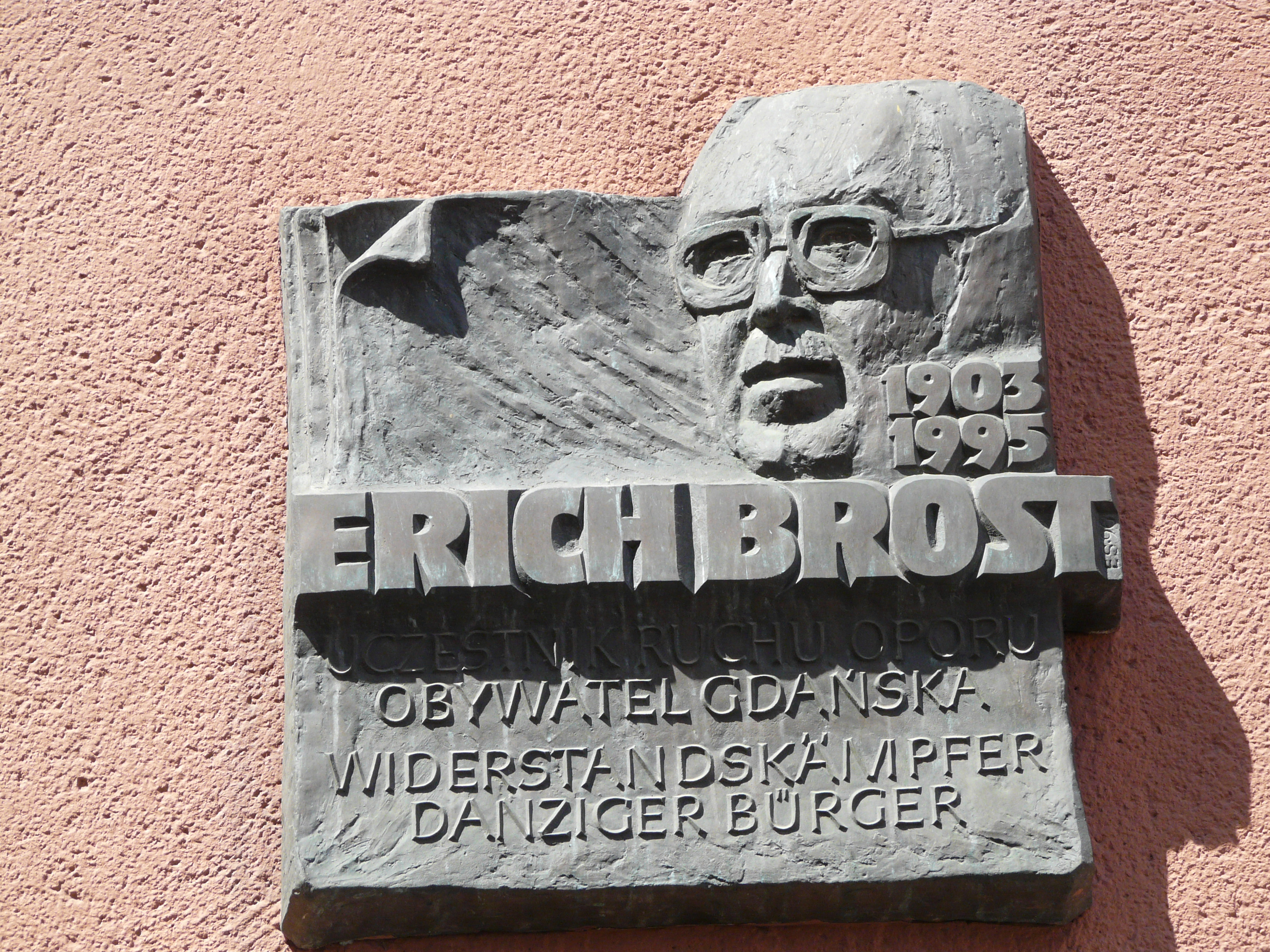 Tablica upamiętniająca Ericha Brosta, ul. Kramarska 7 w Gdańsku (Główne Miasto).